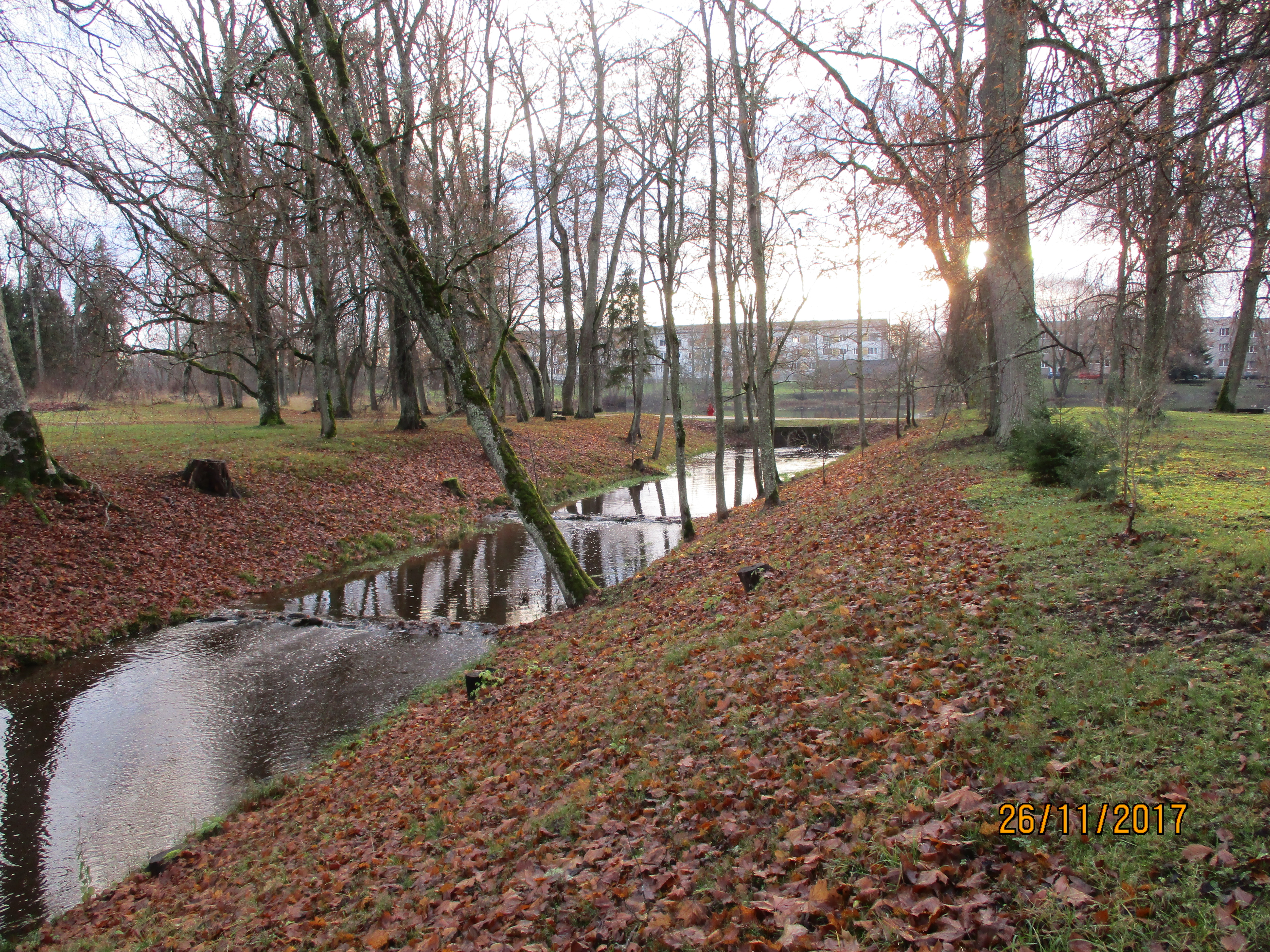 Kagupoolne vallikraav, vaade kirdest.